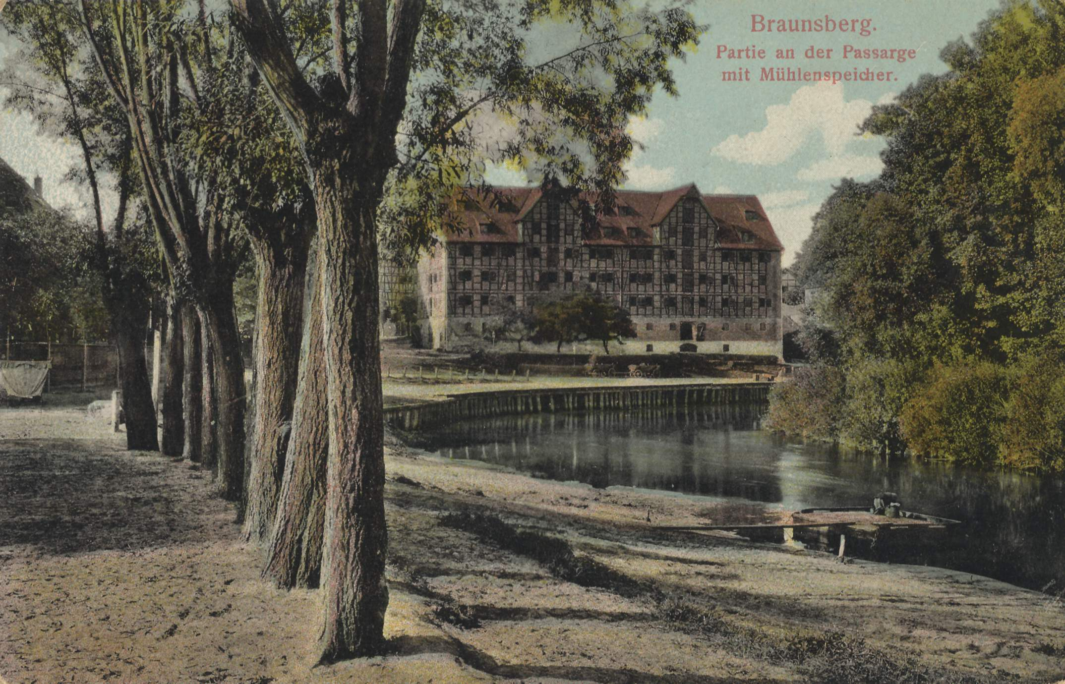 Passage mit Mühlenspeicher